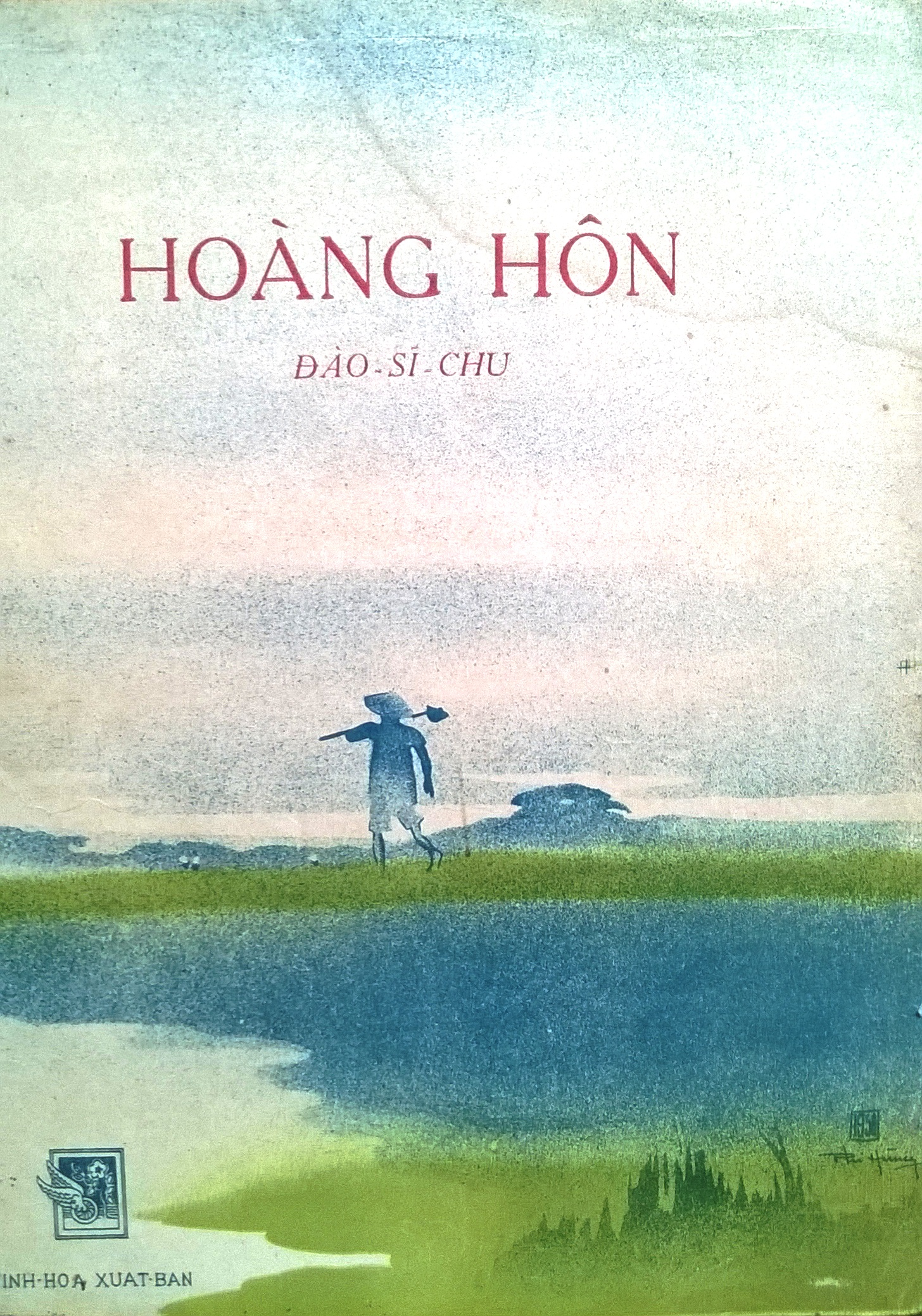 Hoàng Hôn